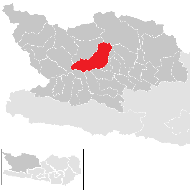 Bezirk Spittal an der Drau